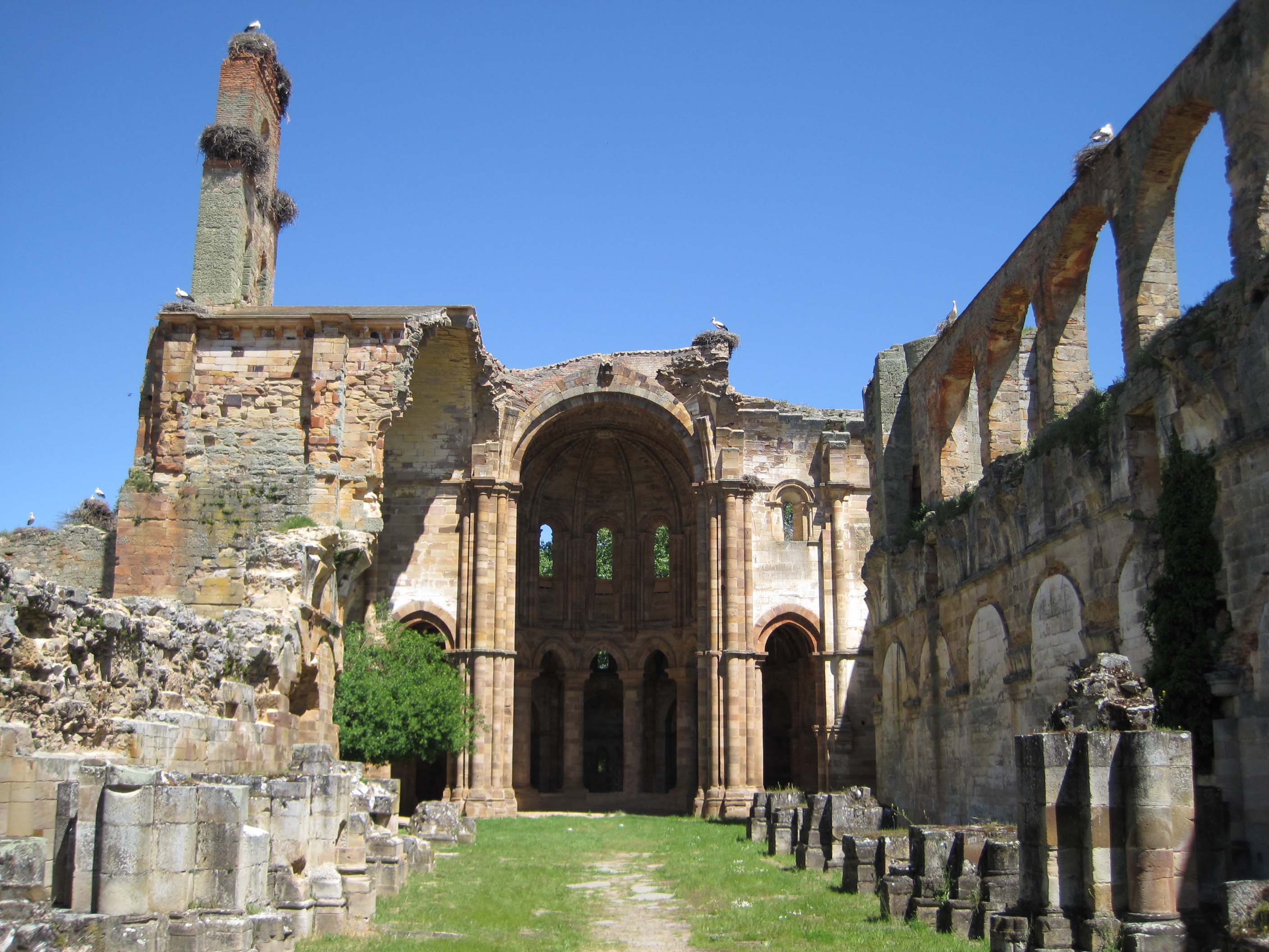 Vista del interior de la nave de la iglesia del Monasterio de Moreruela (Zamora, España).